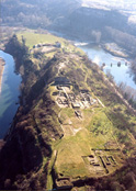 Fotografia aèria del Jaciment Arqueològic de l'Esquerda